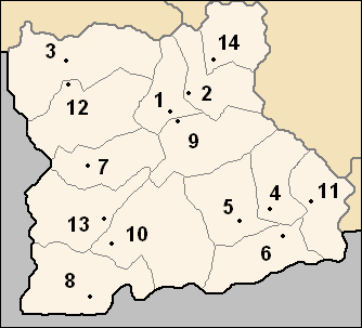 Carte des obchtini (municipalités) de l'oblast de Blagoevgrad, en Bulgarie